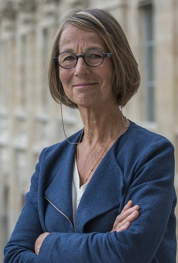 Françoise Nyssen a été nommée ministre de la Culture, le 17 mai 2017.